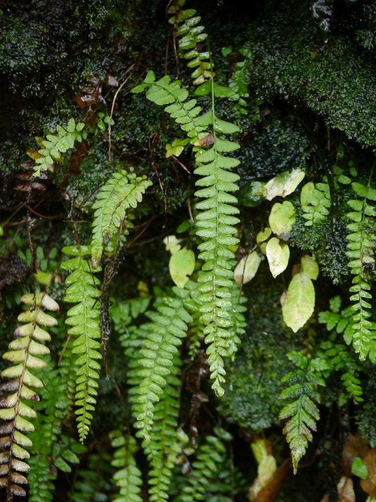 Lindsaea odorata：ホングウシダ 2017/11/03 和歌山県田辺市：Tanabe City. Wakayama Pref. Japan